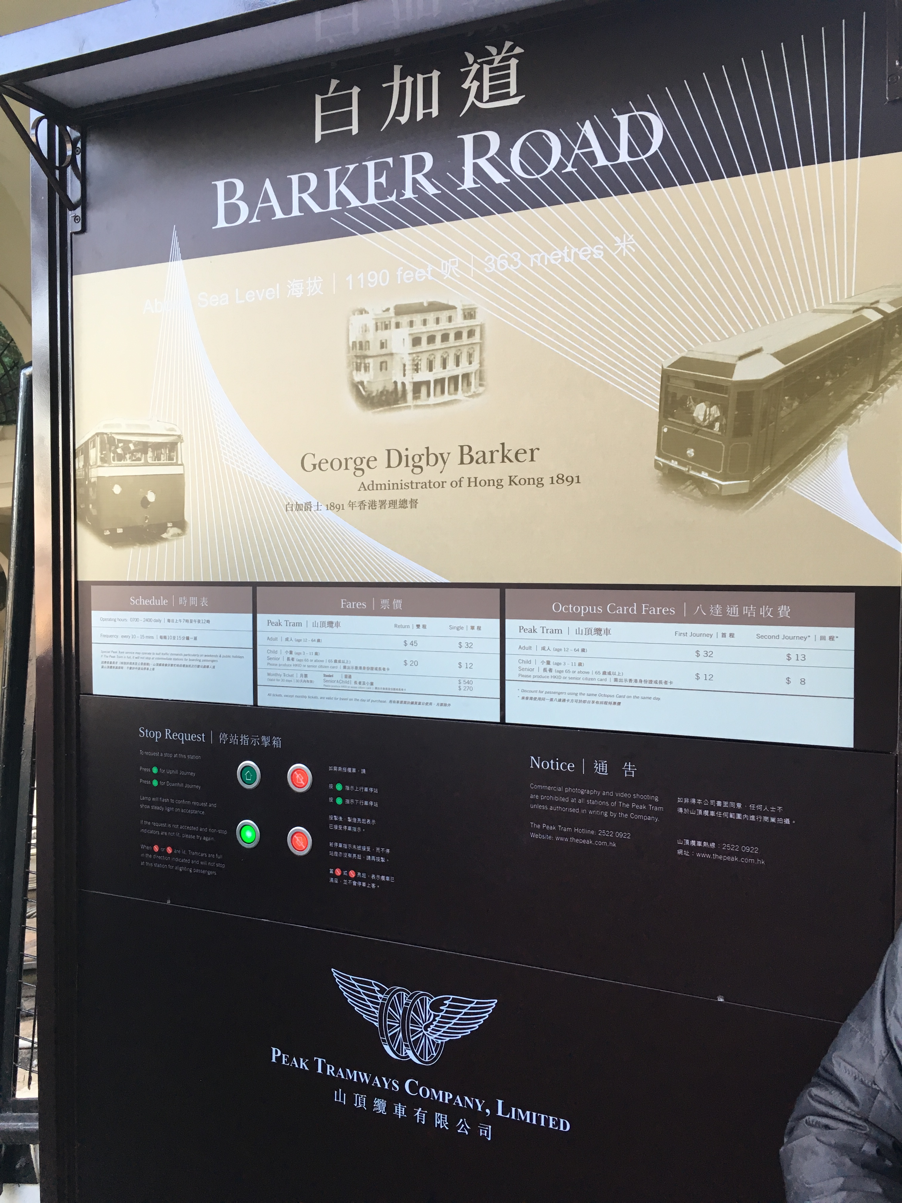 中文（香港）: 山頂纜車白加道站的停站指示掣箱。留意左下角的綠色燈亮起，即表示停車指示已被接受。同時，右邊的紅燈亮起，正常情況下按掣並不會受理其停車指示